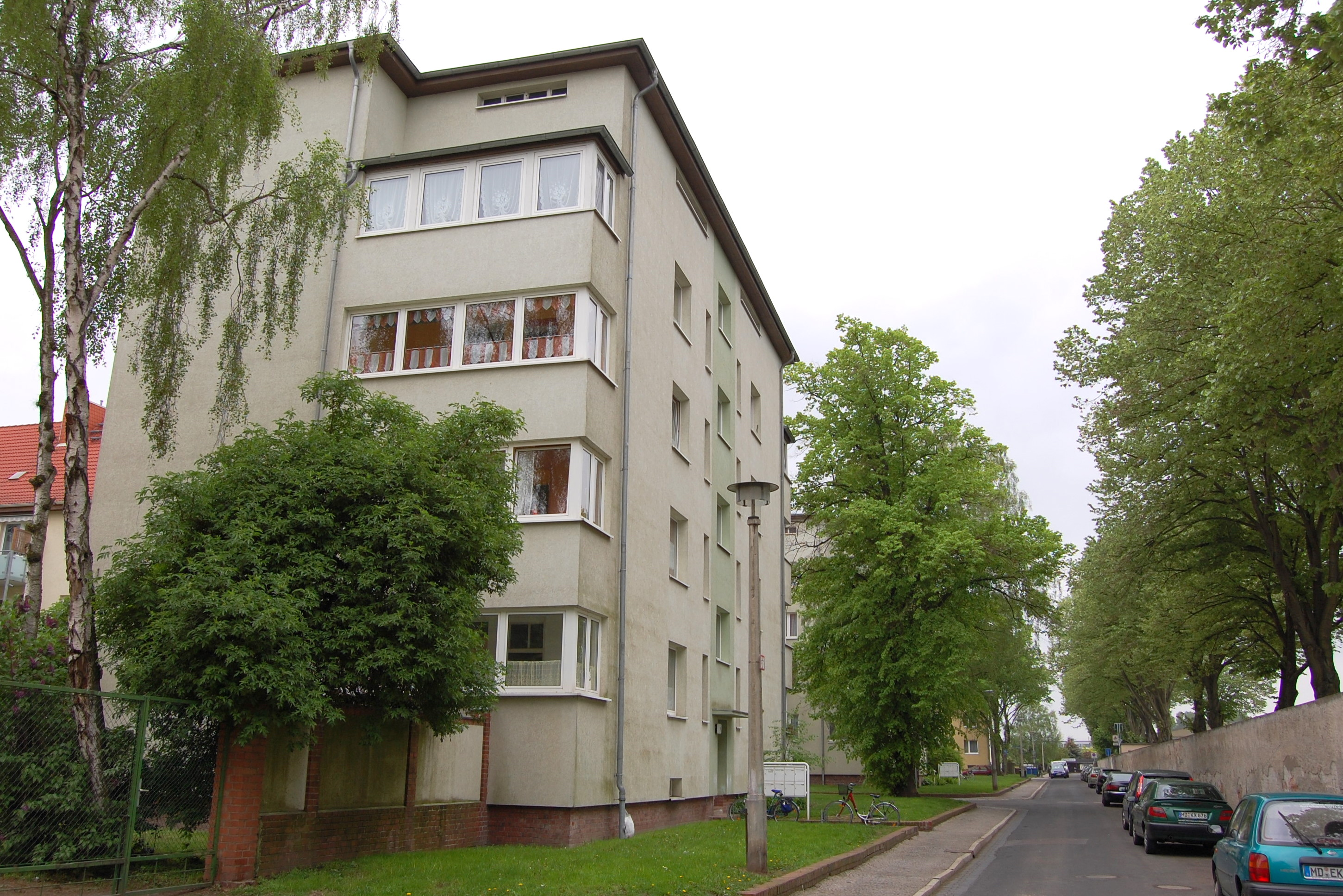 Kopfbauten in der Straße Am Fort in Magdeburg-Fermersleben